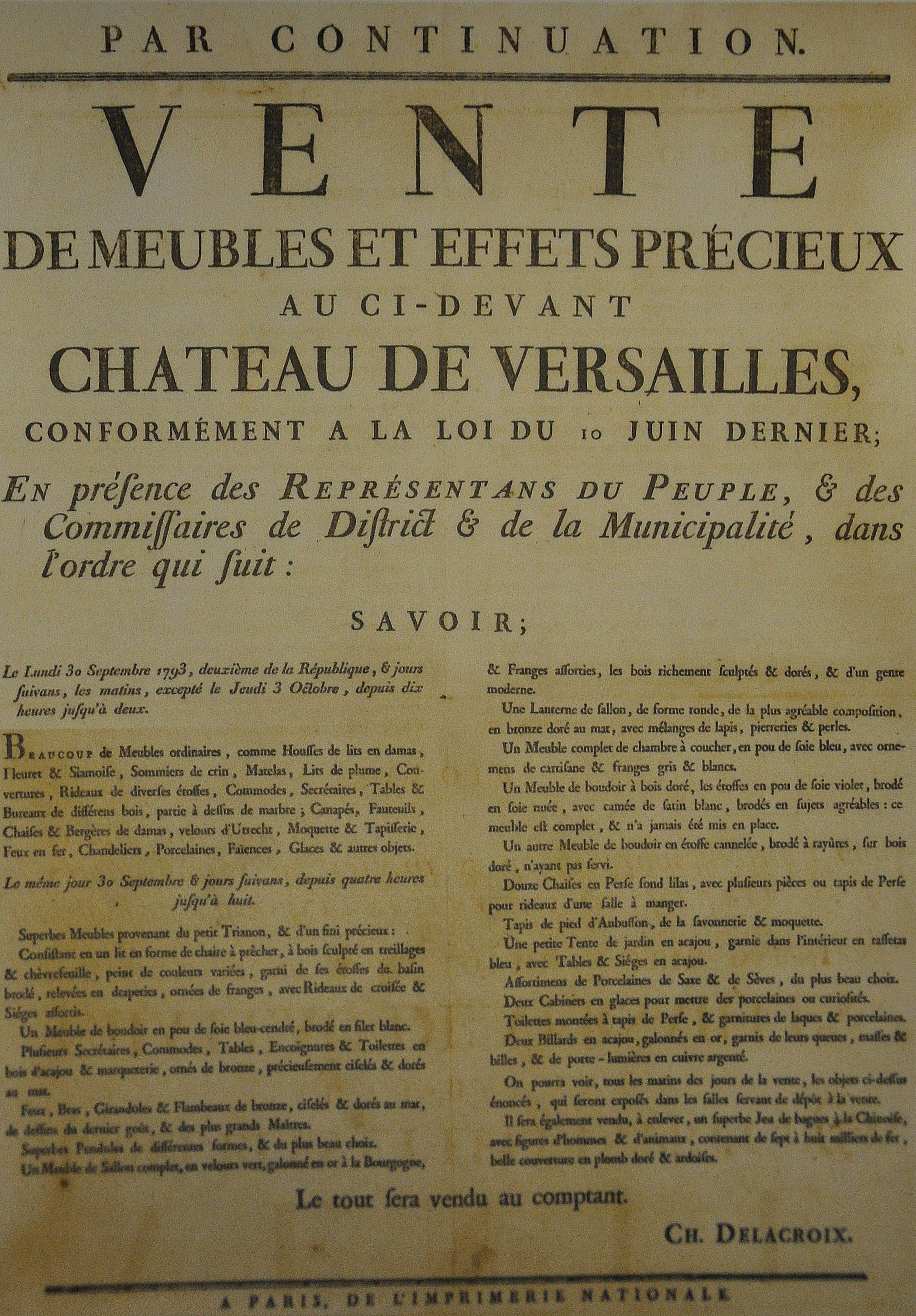 Affiche annonçant la vente aux enchères des meubles du Petit Trianon le 30 septembre 1793, selon la loi du 10 juin 1793